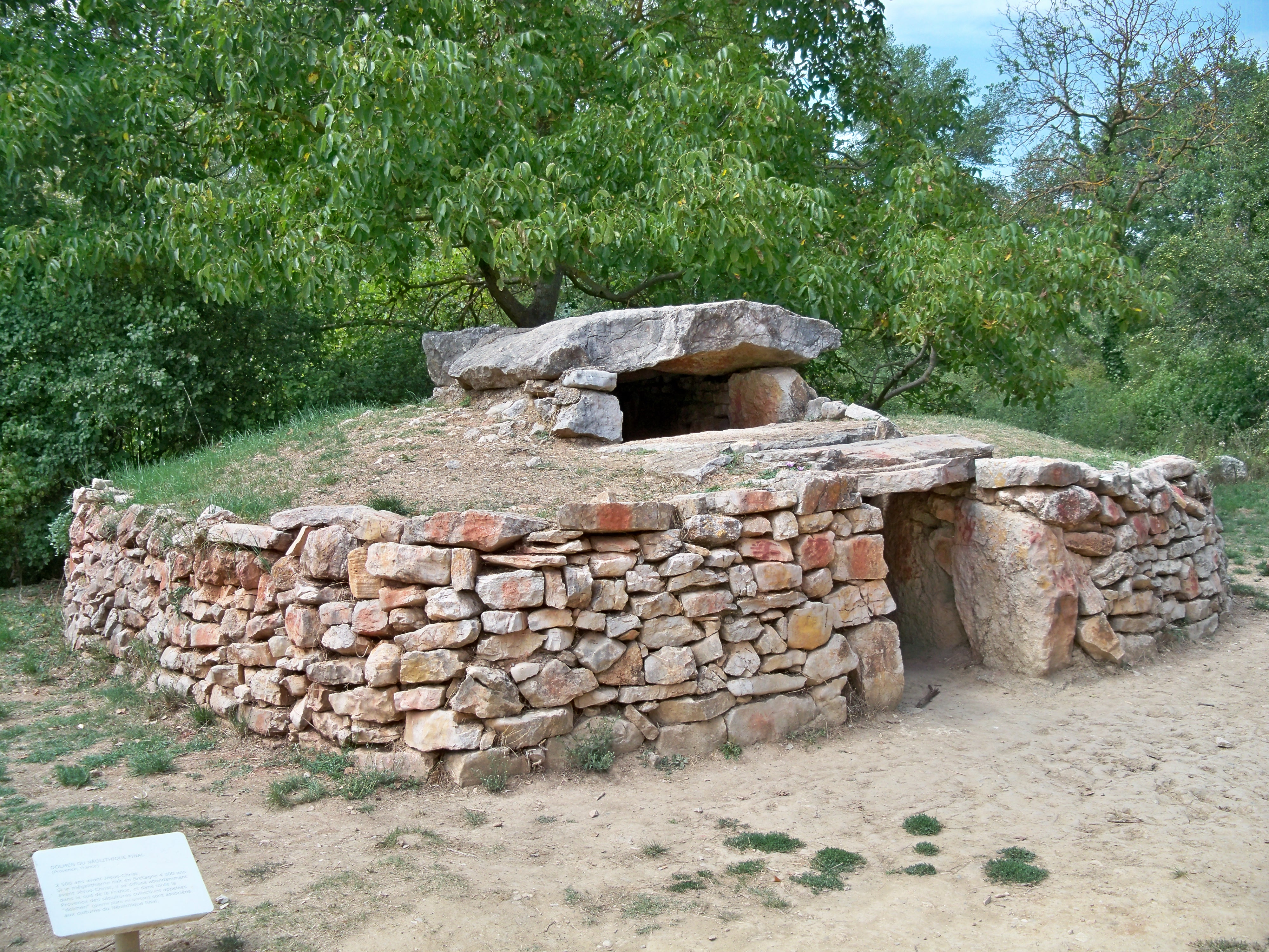 Reconstitution de dolmen à Quinson (04), France